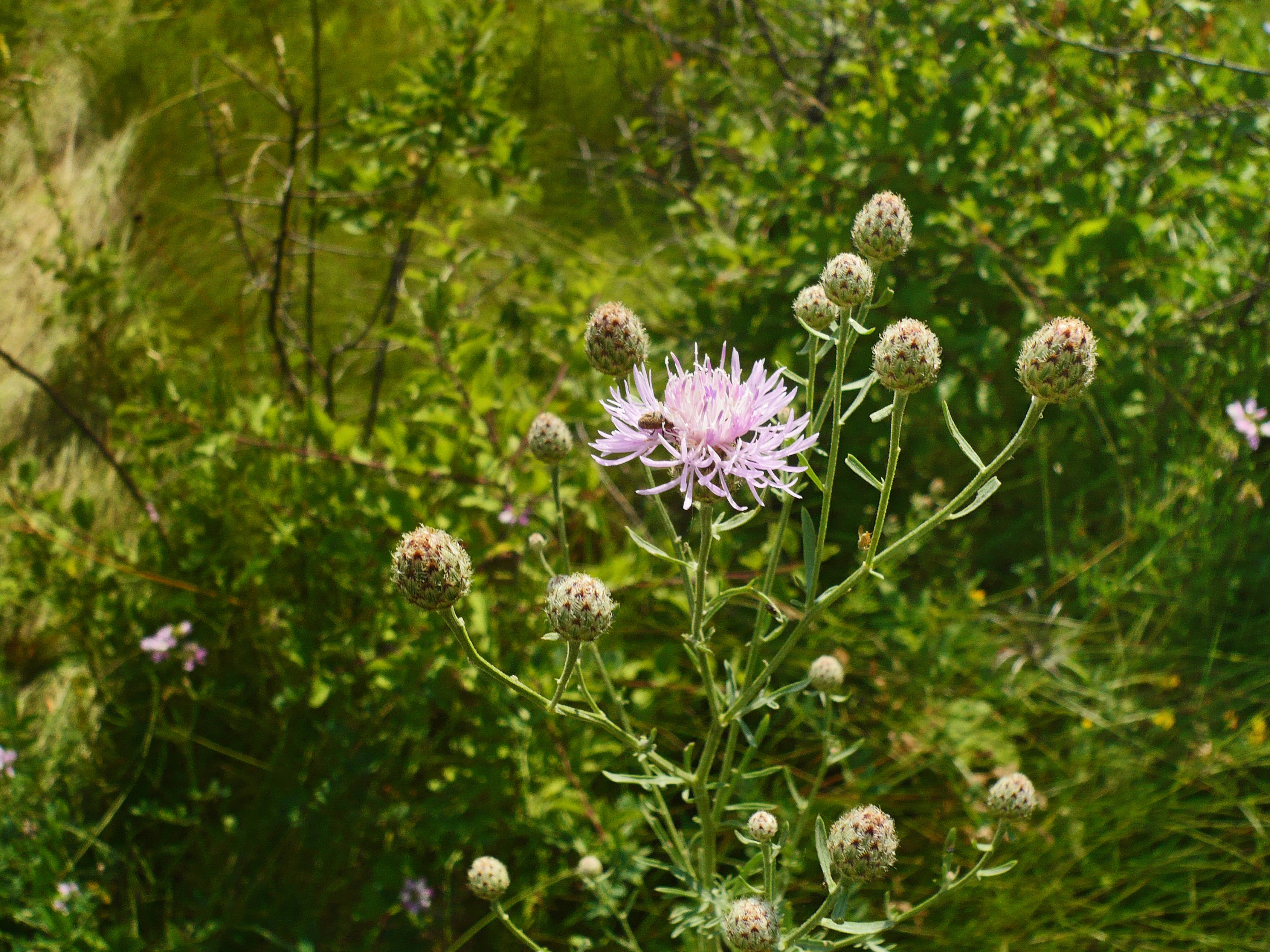 Василёк песчаный. Балка Каменный лог Белгородская область.